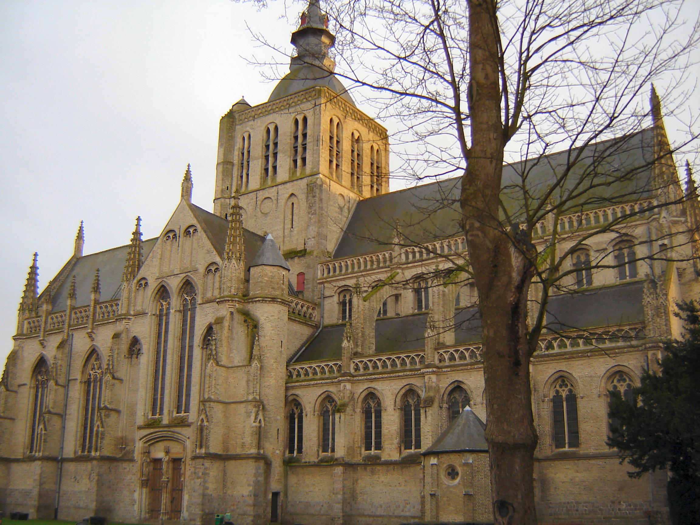 Sint-Janskerk in Poperinge.